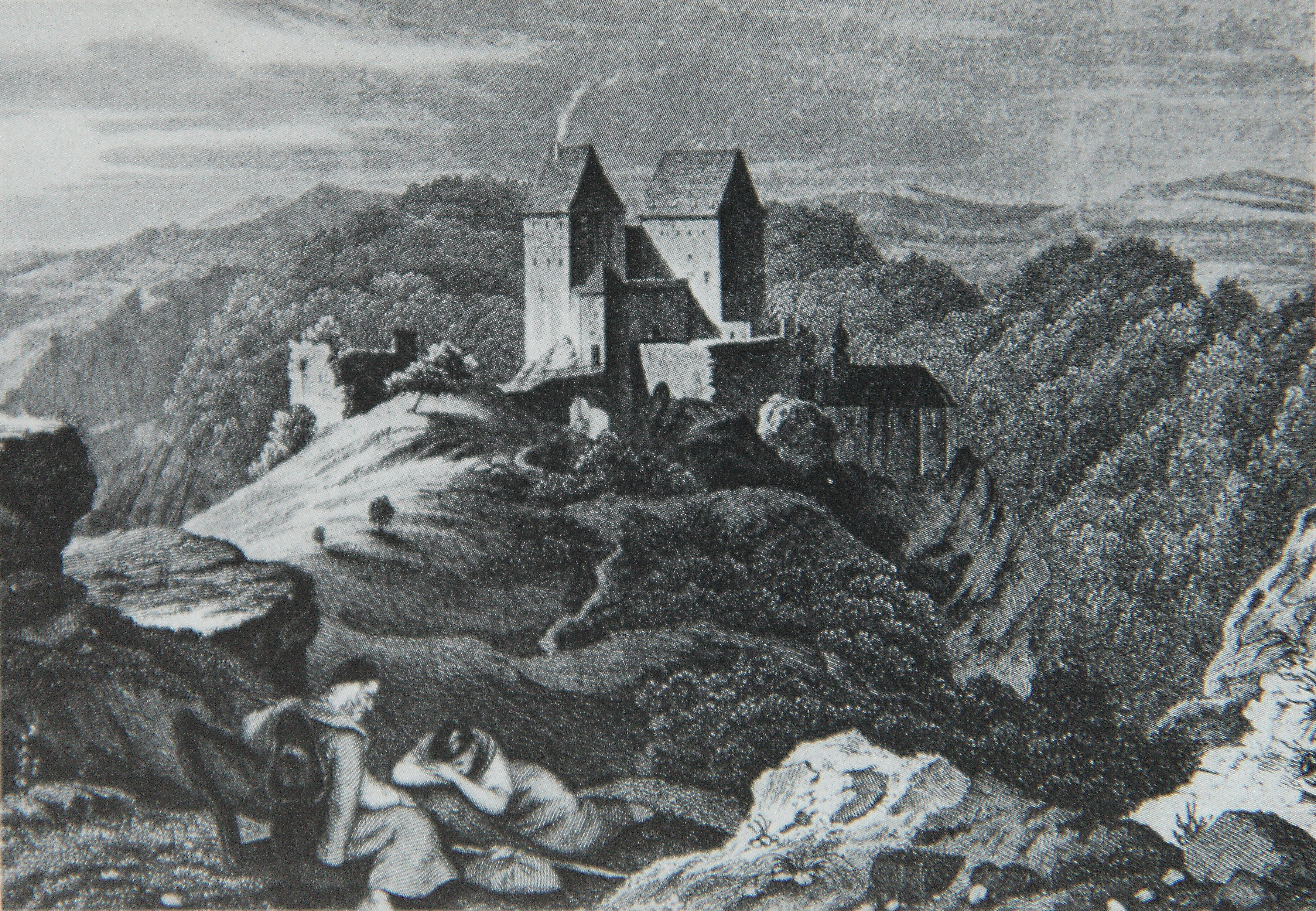 Burg Rabeneck aus südöstlicher Richtung auf einem Stich von E. Grünewald nach einer Zeichnung von Ludwig Richter aus dem Jahr 1839